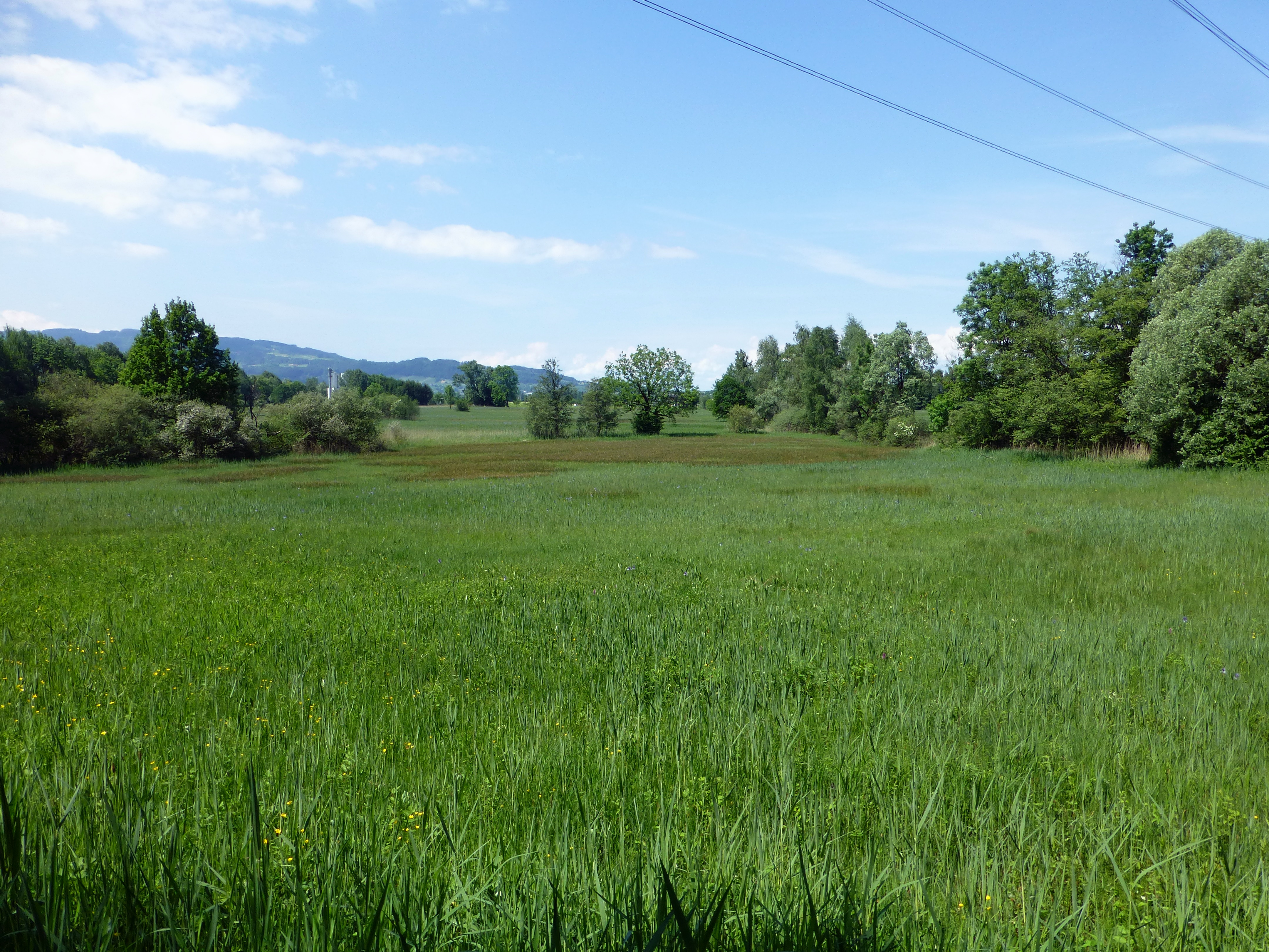 Blick von Süden auf die Parzelle Obere Mähder, Teil des Naturschutzgebiets und Natura-2000-Gebiets Gsieg - Obere Mähder This media shows the nature reserve in Vorarlberg with the ID 8011.